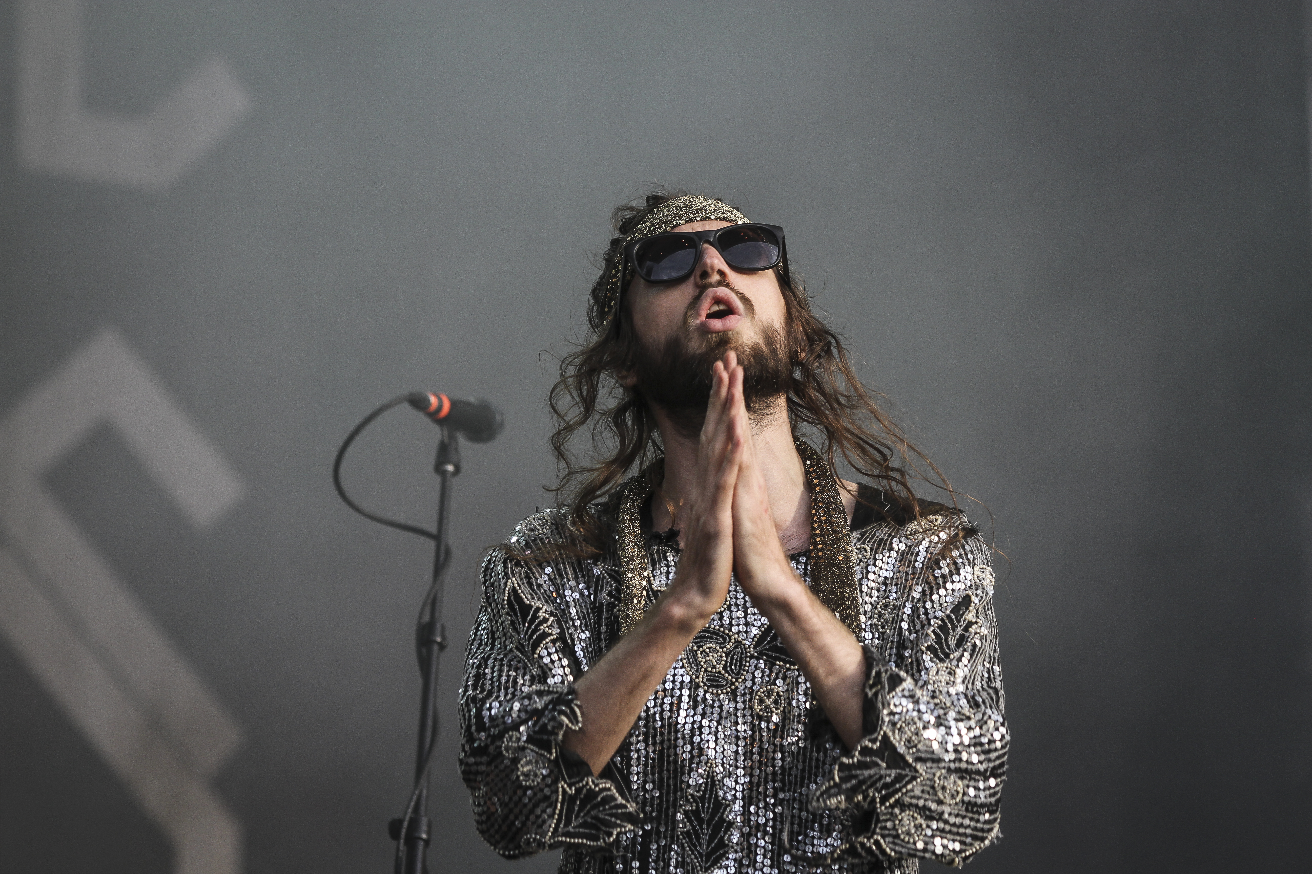 Crystal Fighters auf dem Dockville Festival 2013